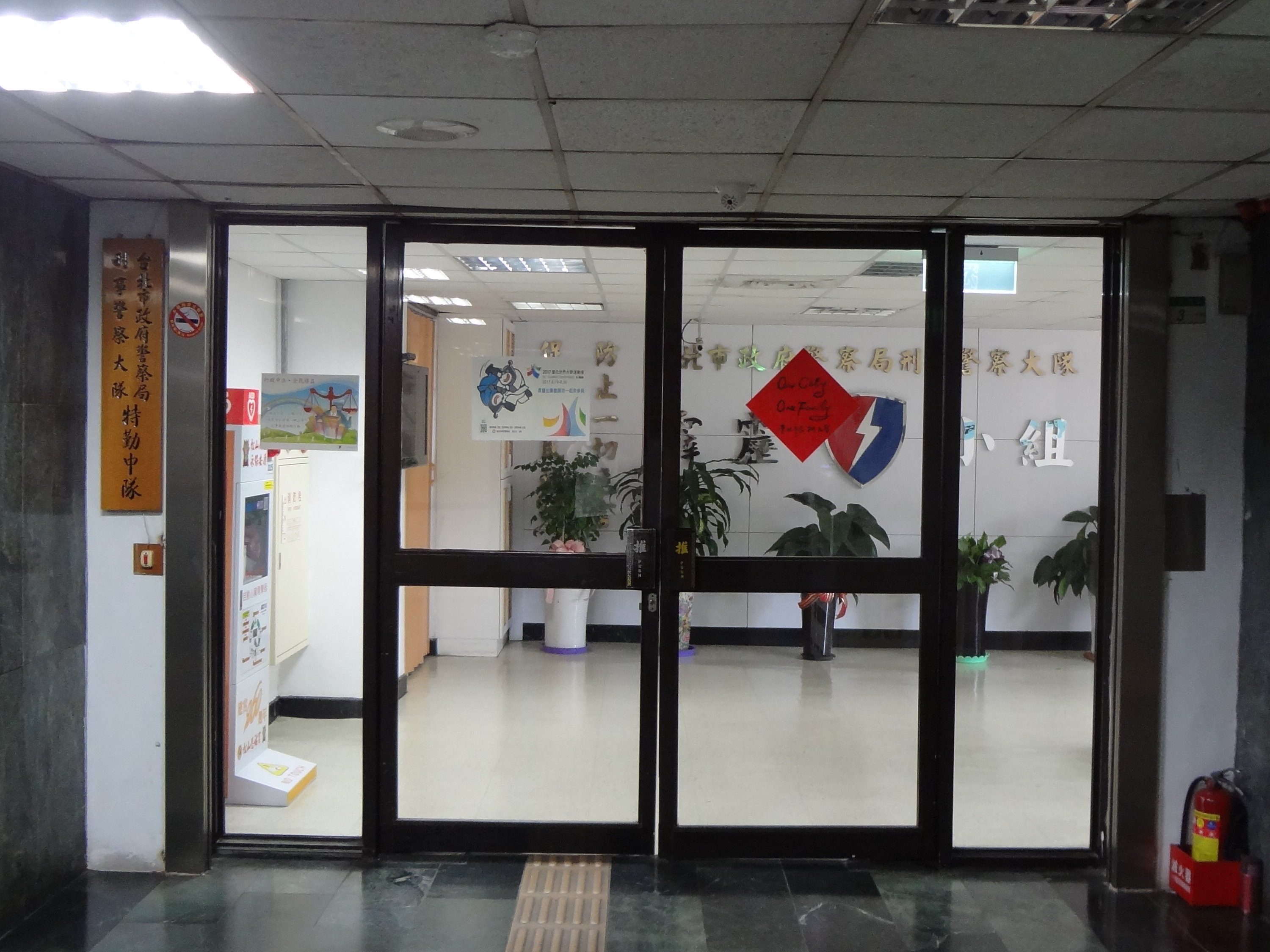 中文（台灣）: 臺北市政府警察局刑事警察大隊特勤中隊，位於臺北市中山區長安西路3號5樓。